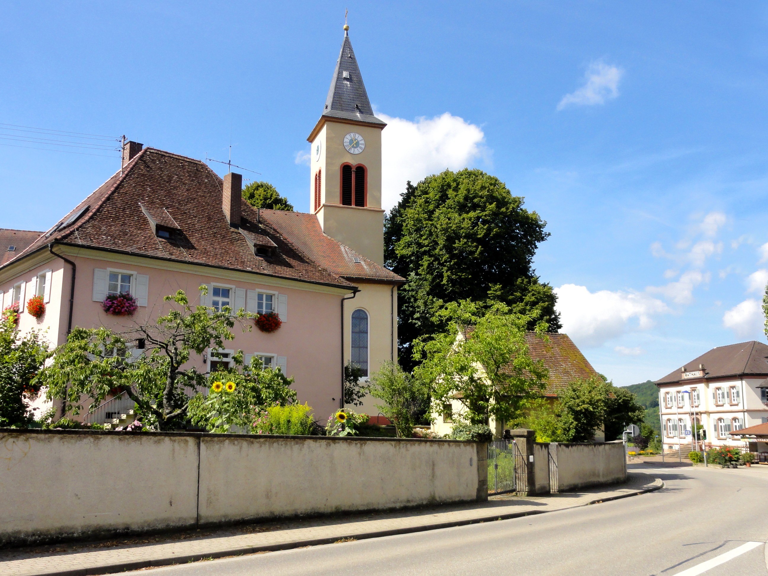 Baden-Württemberg, Bollschweil, Pfarrkirche St. Hilarius